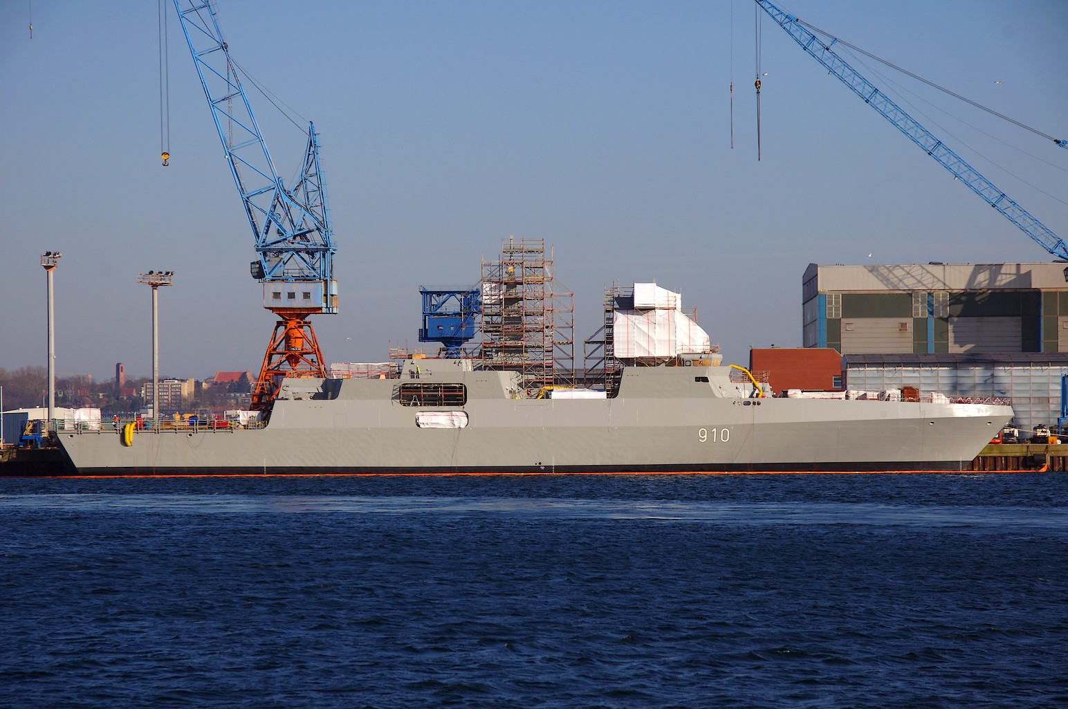 Frégate furtive de classe Valour (Meko A-200) au port de Kiel en Allemagne, construite par TKMS au profit de la Marine nationale algérienne.